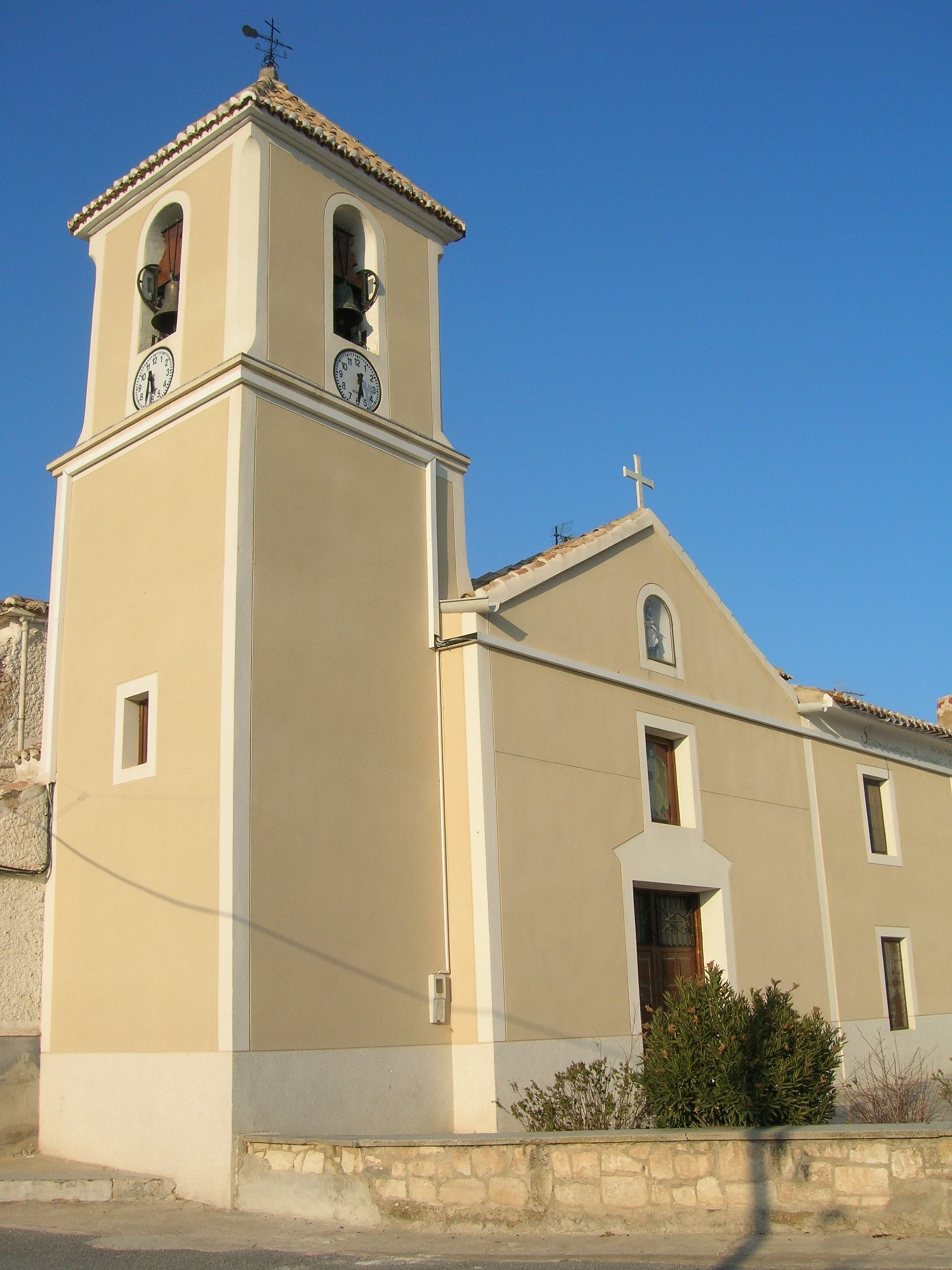 Iglesia de Archivel Imagen de Archivel, pedanía de Caravaca de la Cruz, en Murcia, España.